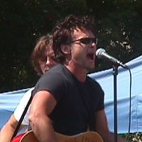 Mellencamp sept2000